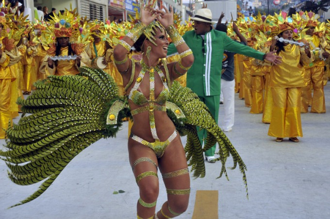 Desfile de 2009 dos Acadêmicos de Santa Cruz.Foto: Ricardo Almeida.